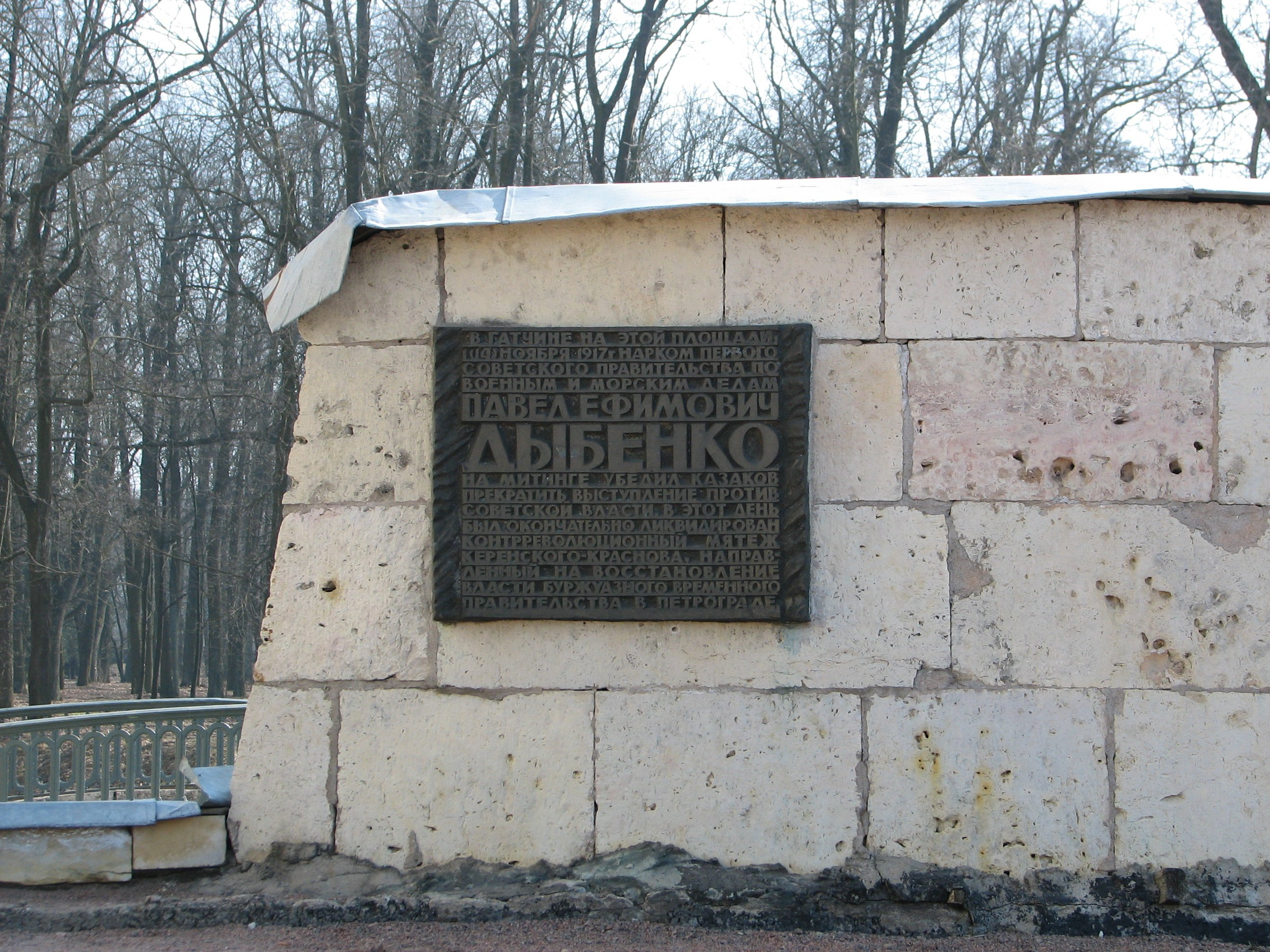 Мемориальная доска на одном из бастионов около Большого Гатчинского дворца